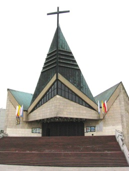 kościół pw św. Maksymiliana osiedlu Tysiąclecia w Krakowie